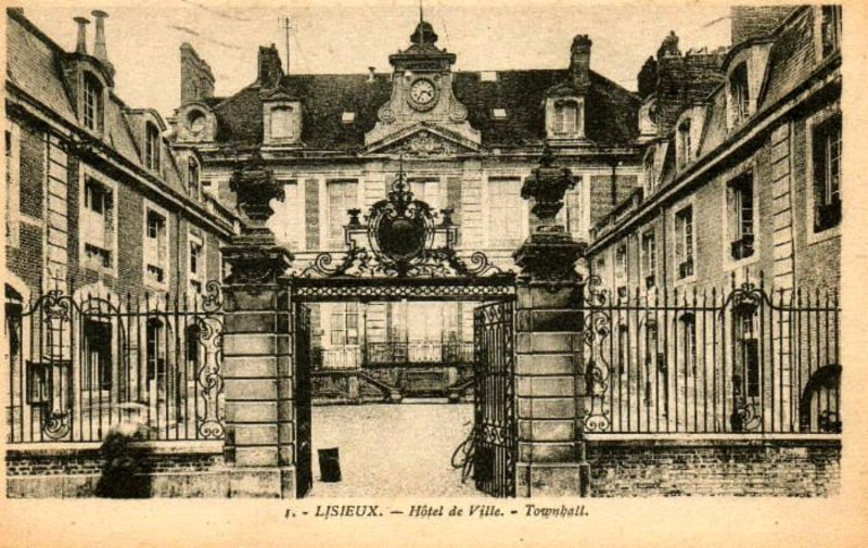 Lisieux, département du Calvados, sur une carte postale de la fin du 19e ou du début du 20e siècle. Vue de la façade de la mairie. Devant le portail d'entrée situé 21 Rue Henry Chéron. Vue du Nord vers le Sud.